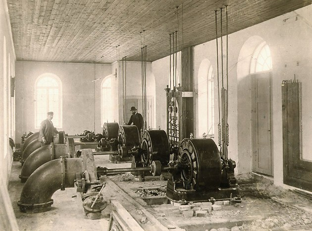 Interiör av Hellsjöns kraftstation vid montaget sommaren 1893. Längst bort syns generator 1 för belysning med endast två ledare upp till taket. De övriga har tre ledare. Mannen i plommonstopet med skägg är troligen ingenjör E. K. Pettersson, som var ledare för montaget och senare driftingenjör. Foto: Albin Andersson